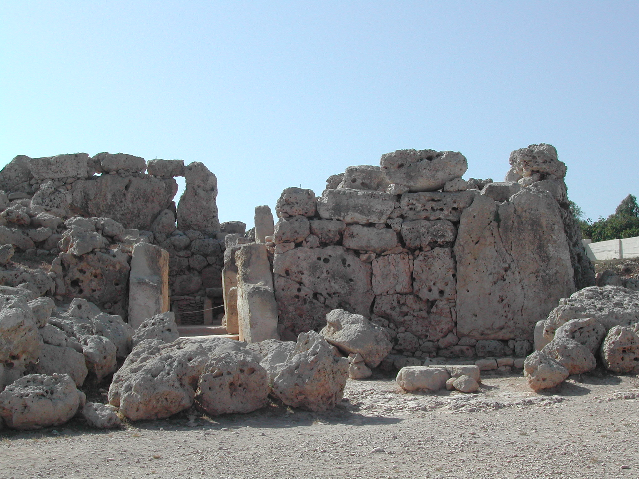 Tempel_vu_Ggantija.